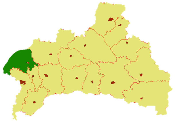 Kamjaněcký rajón v rámci Brestské oblasti